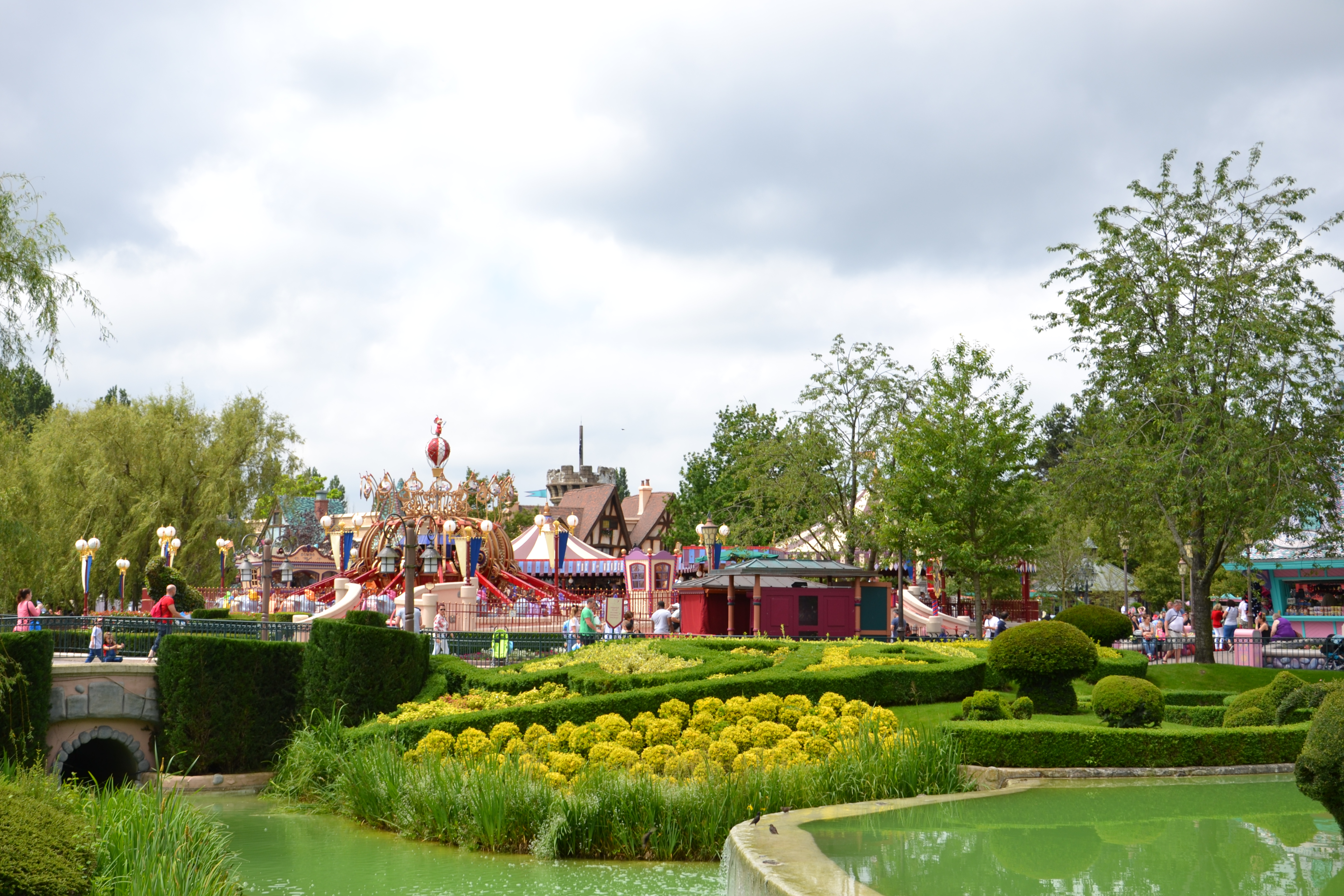 Disneyland Paris